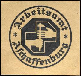 Sealing stamp Title: Arbeitsamt Aschaffenburg Description: Stempelmarke, schwarz, weiß Place: Aschaffenburg size: 5x5 cm